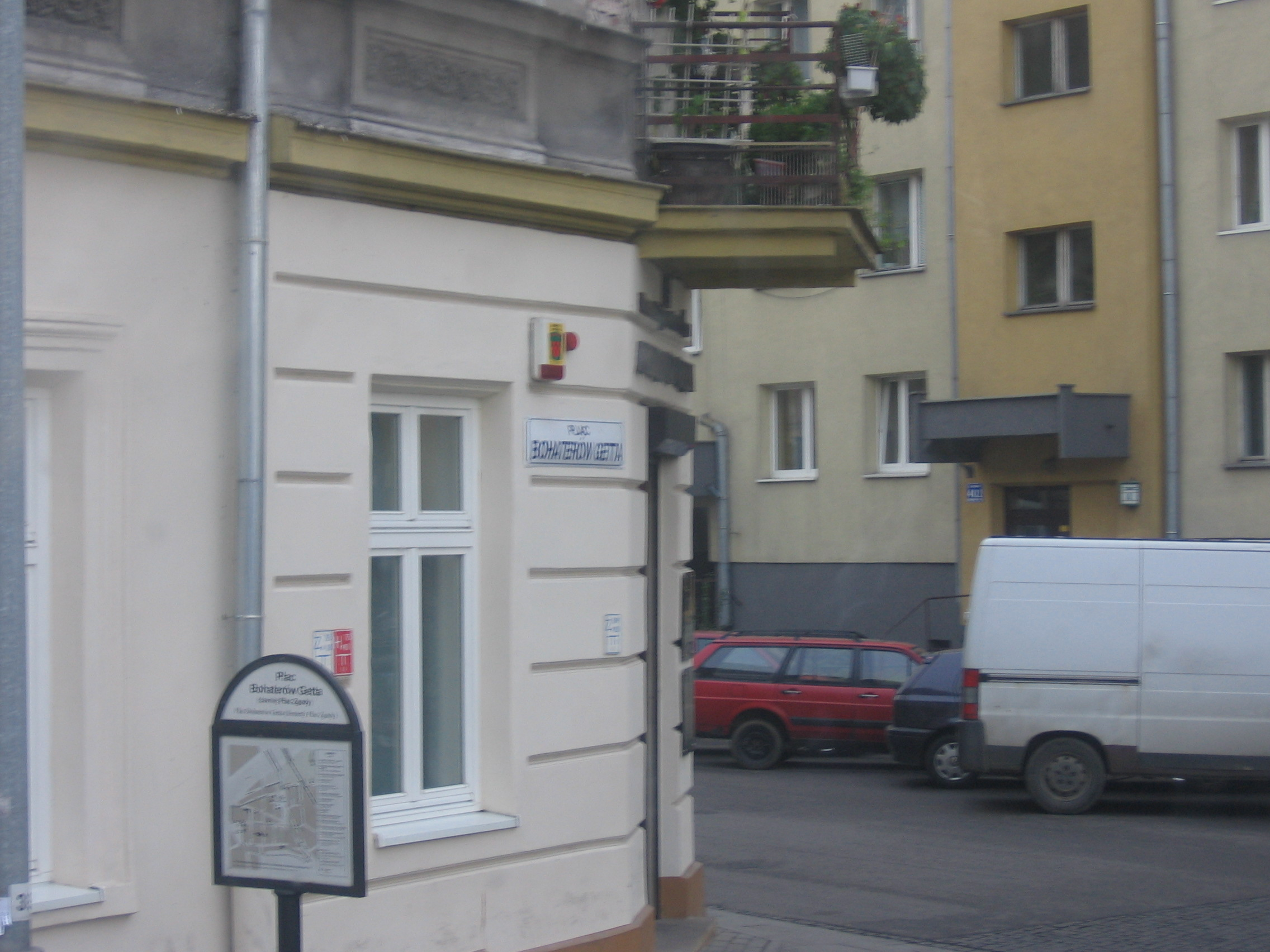 בית המרקחת של תדאוש פאנקייוויץ', גטו קרקוב